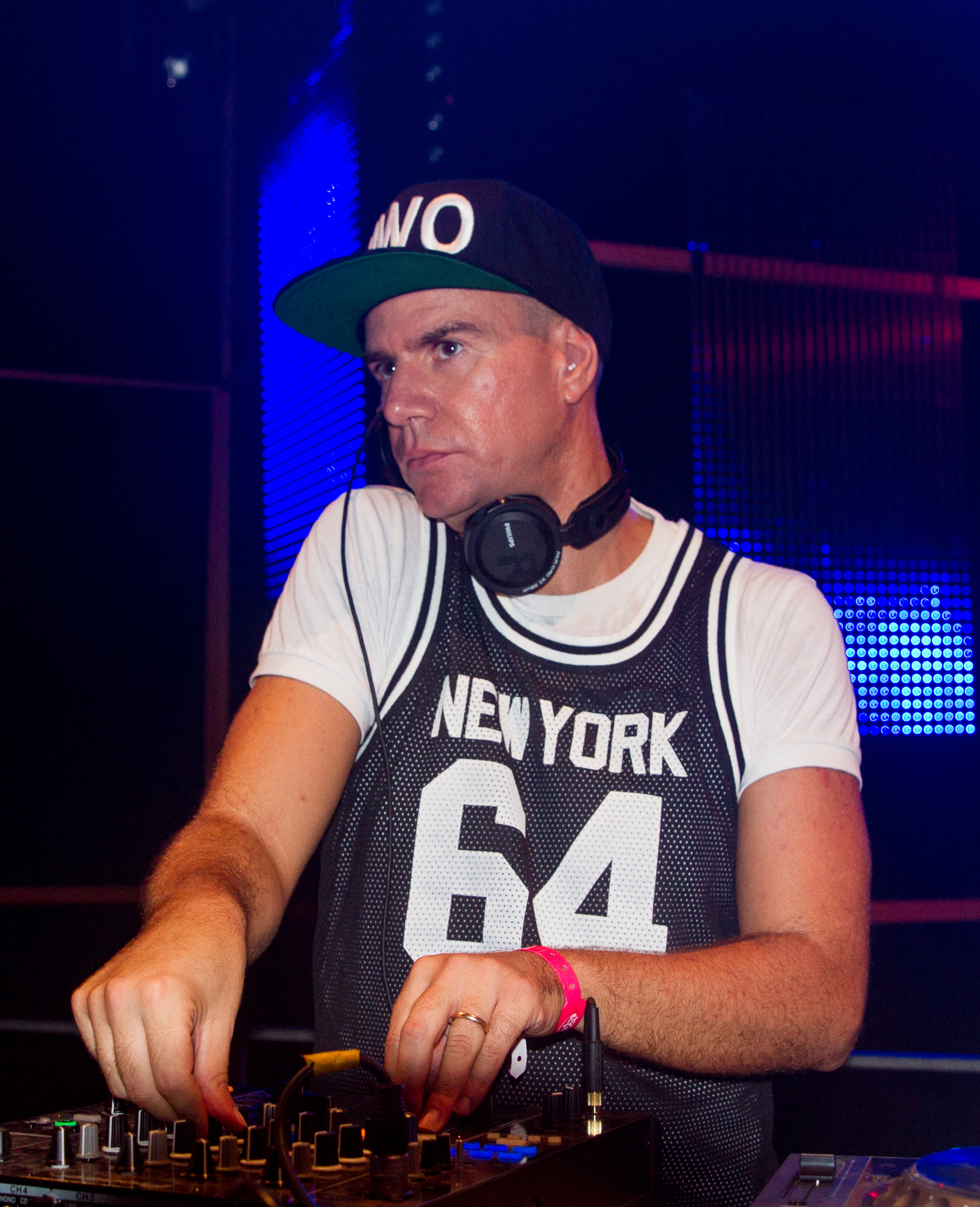 Zatox (Gerardo Roschini) beim 14. Airbeat-One Dance Festivals das vom 16. bis 19. Juli 2015 auf dem Flugplatz Neustadt-Glewe stattfand.